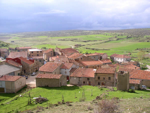 Clares